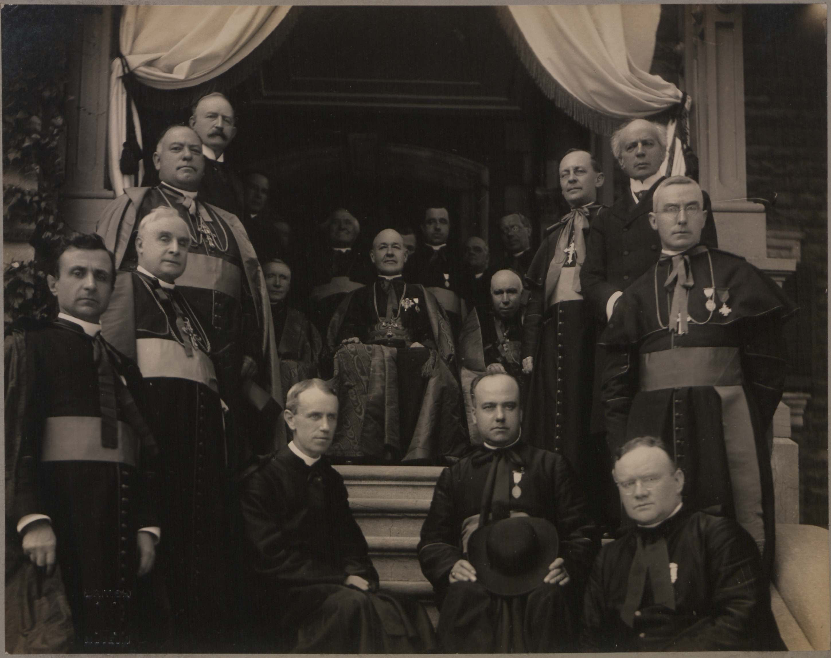 Groupe pris chez M. Shaughnessy, XXme Congrès eucharastique à Montréal.